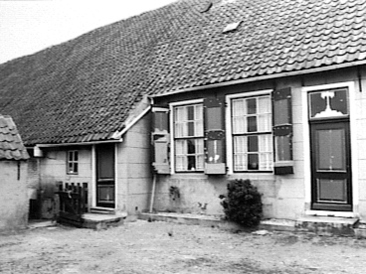 Ridderstee: zijgevel woongedeelte (opmerking: Deze afbeelding hebben wij helaas alleen in deze lage resolutie.)